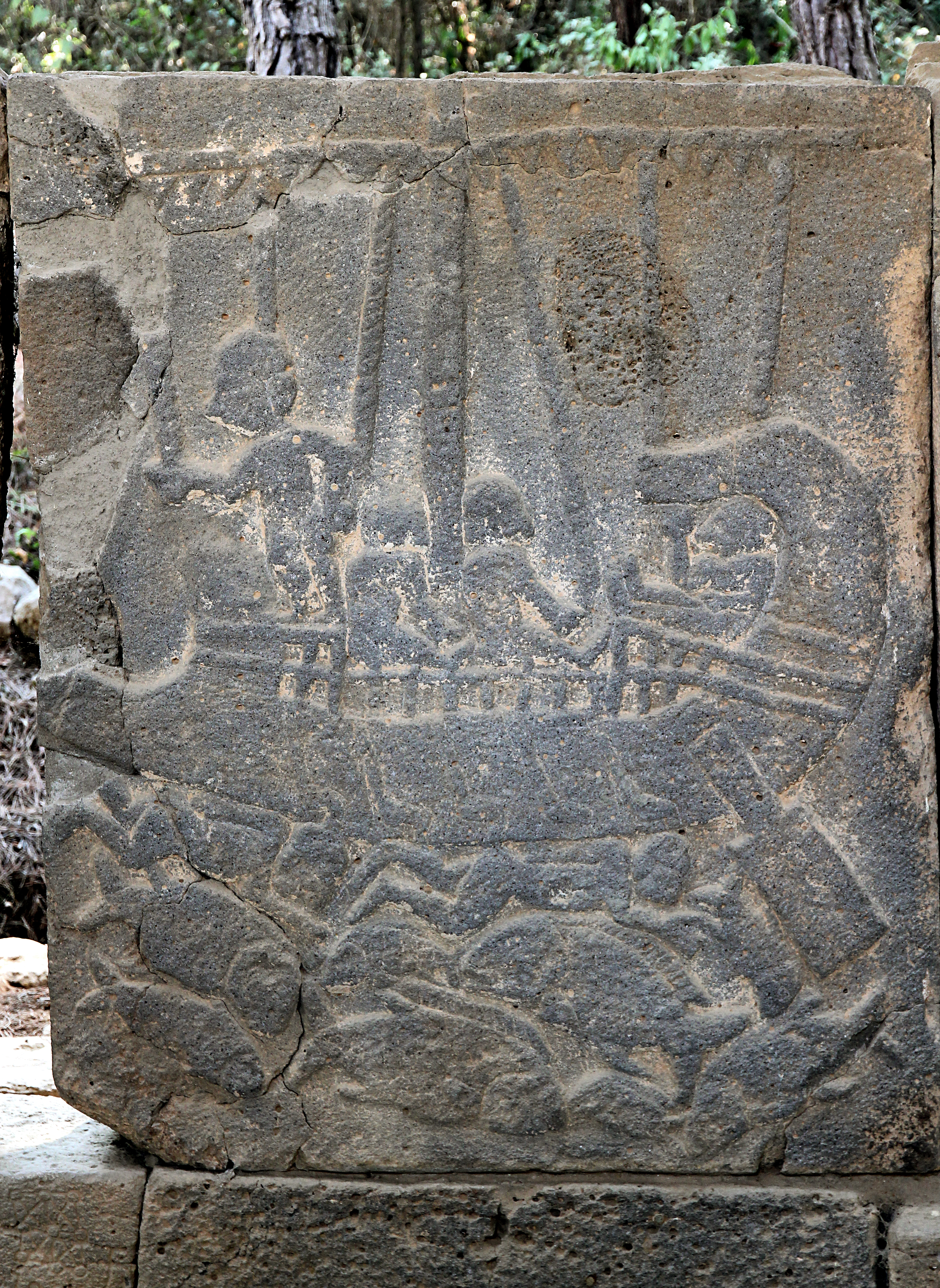 Karatepe (Asatiwataya), neo-hethitischer Fundort bei Osmaniye, Südtürkei, Nordtor, Darstellung einer Galeere, die Mannschaft ruht an Deck, im Wasser sind die Körper besiegter Feinde und Fische zu sehen